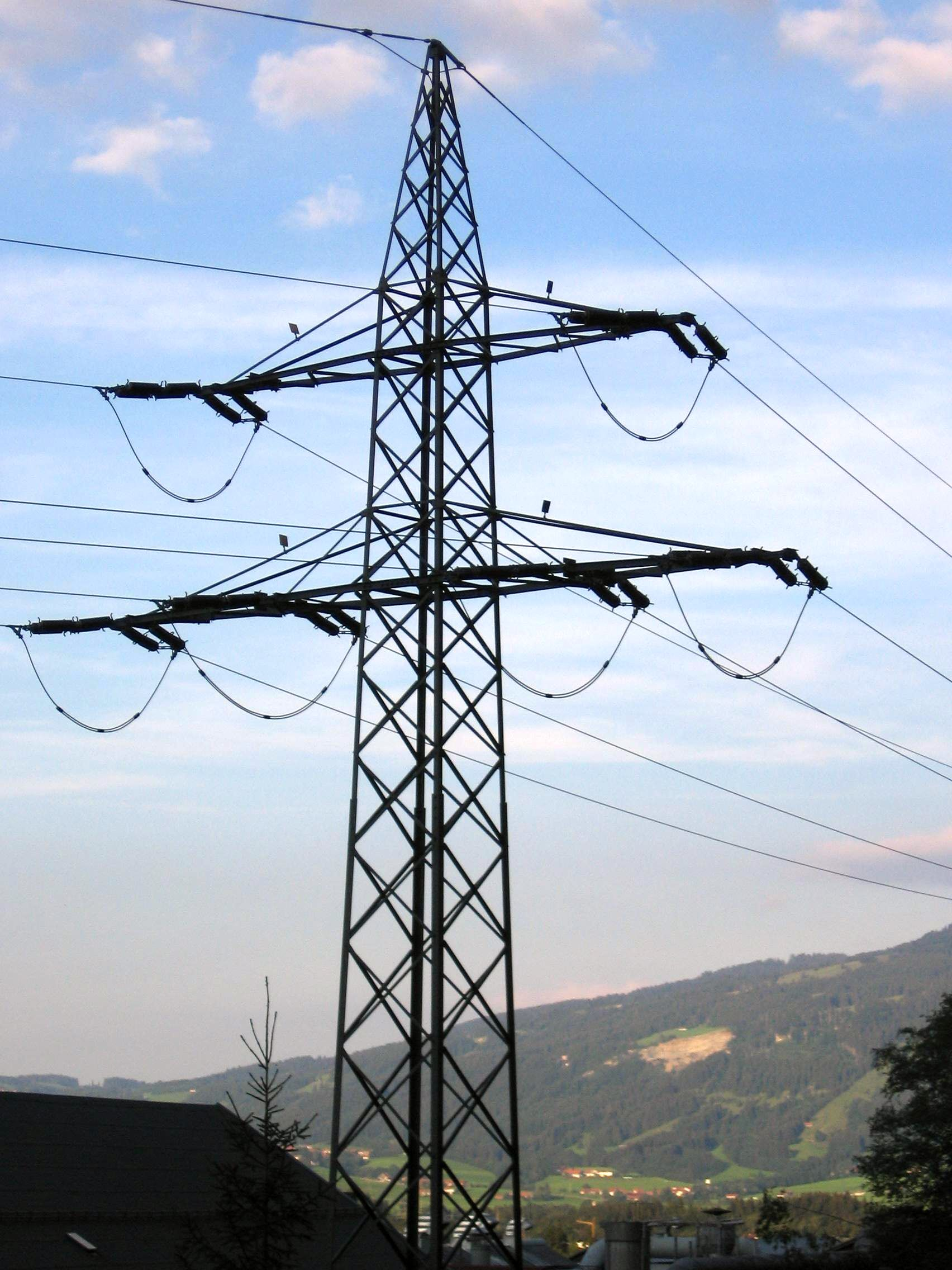 Zusehen ist ein Gittermast in Donauanordnung